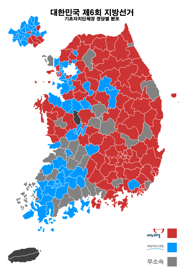 대한민국 제6회 지방선거, 기초자치단체장 정당별 분포